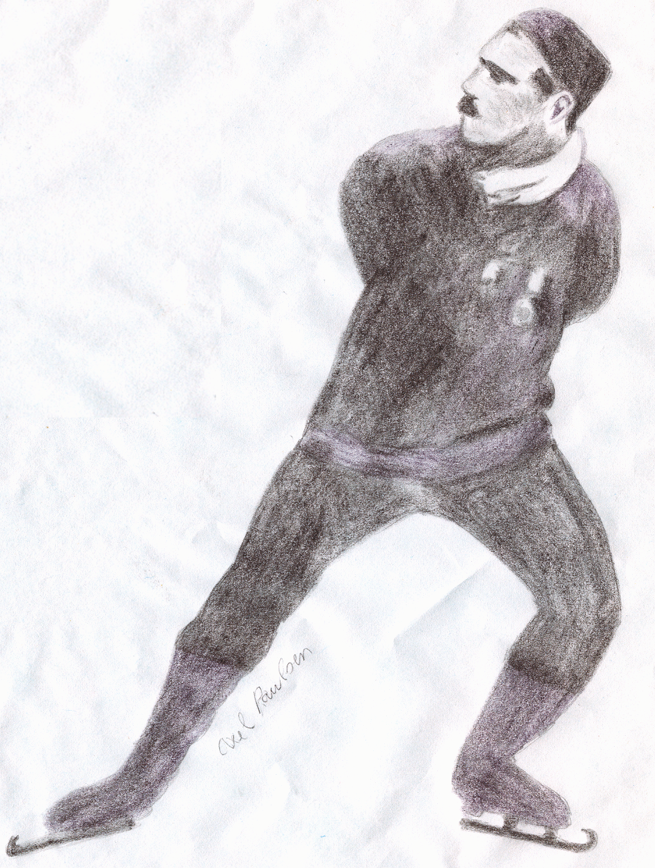 Axel Paulsen - Figure Skater (drawing) Source: Helena Grigar